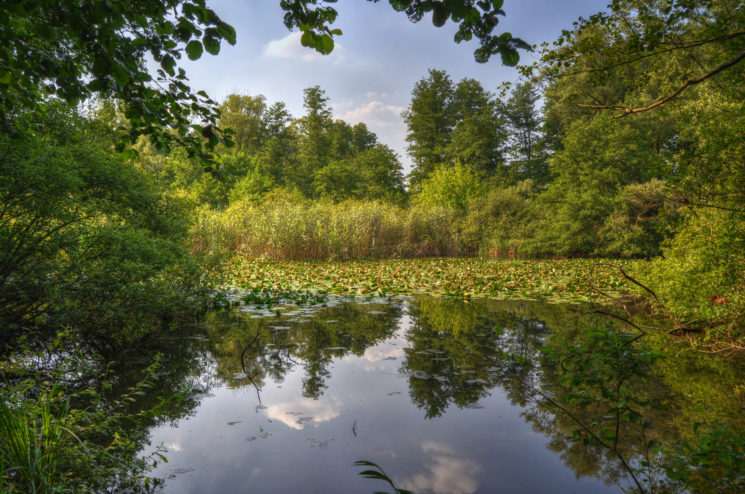 Torbiere del Bassone di Albate This is a photo of a monument which is part of cultural heritage of Italy.